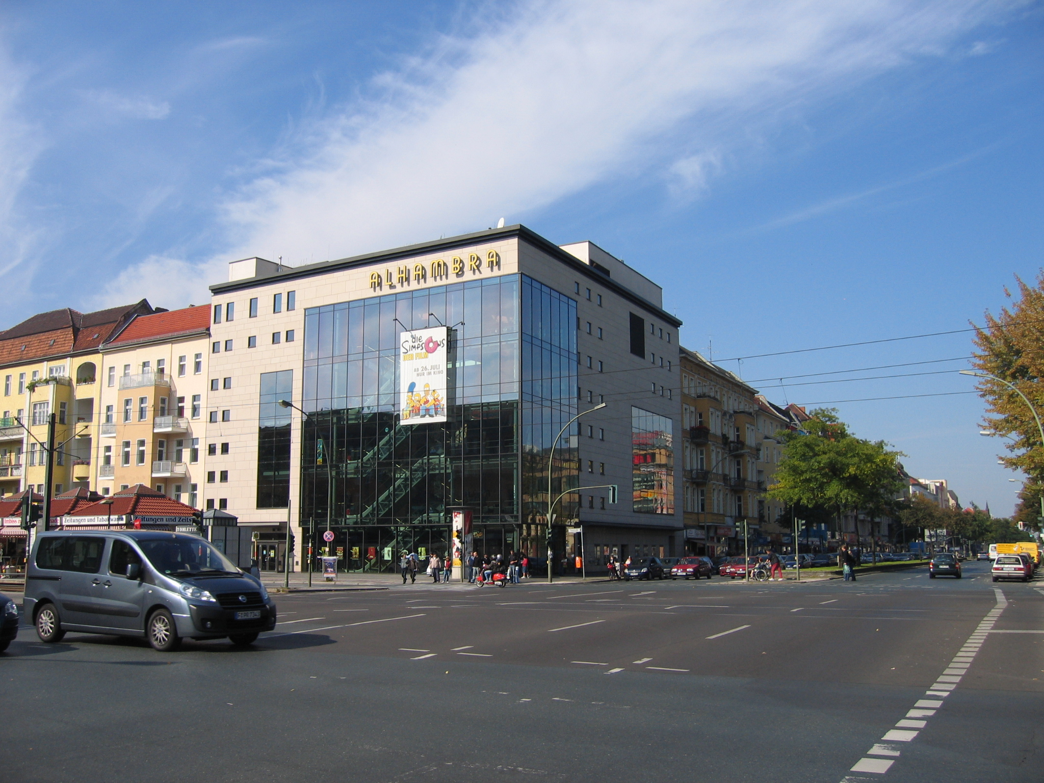 Kreuzung Seestraße / Müllerstraße, Kino „Alhambra“, Berlin-Wedding